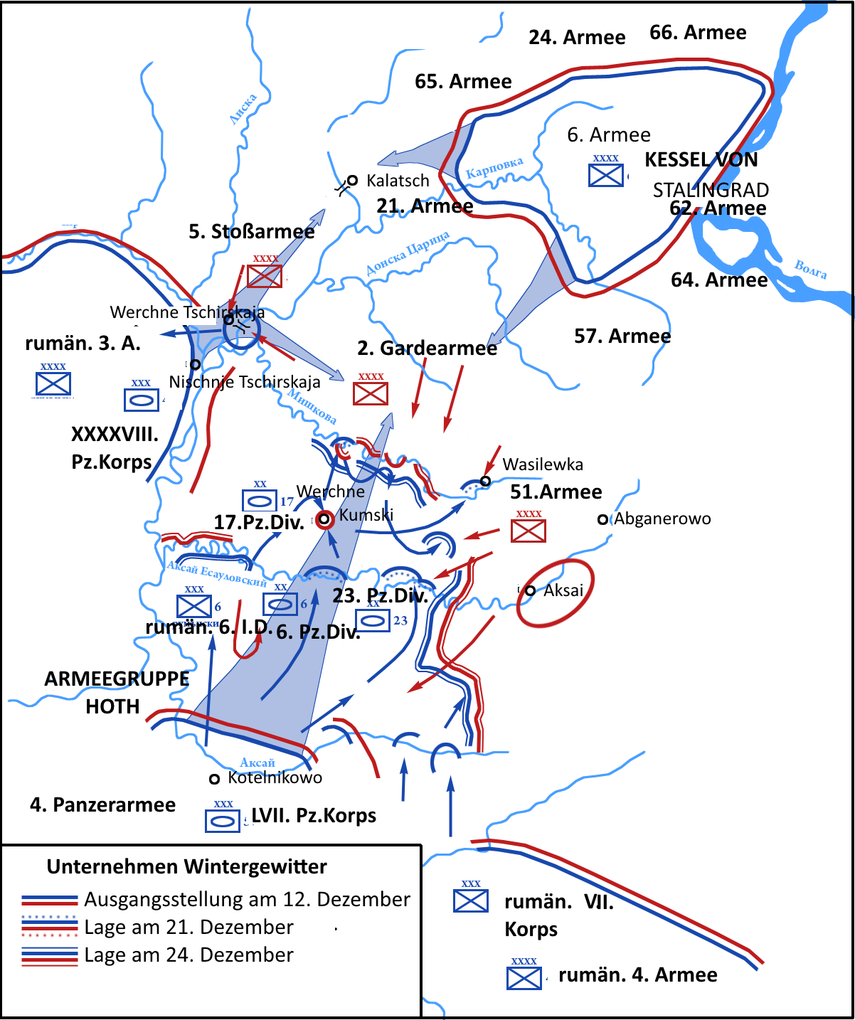 Operation Wintergewitter im Dezember 1942